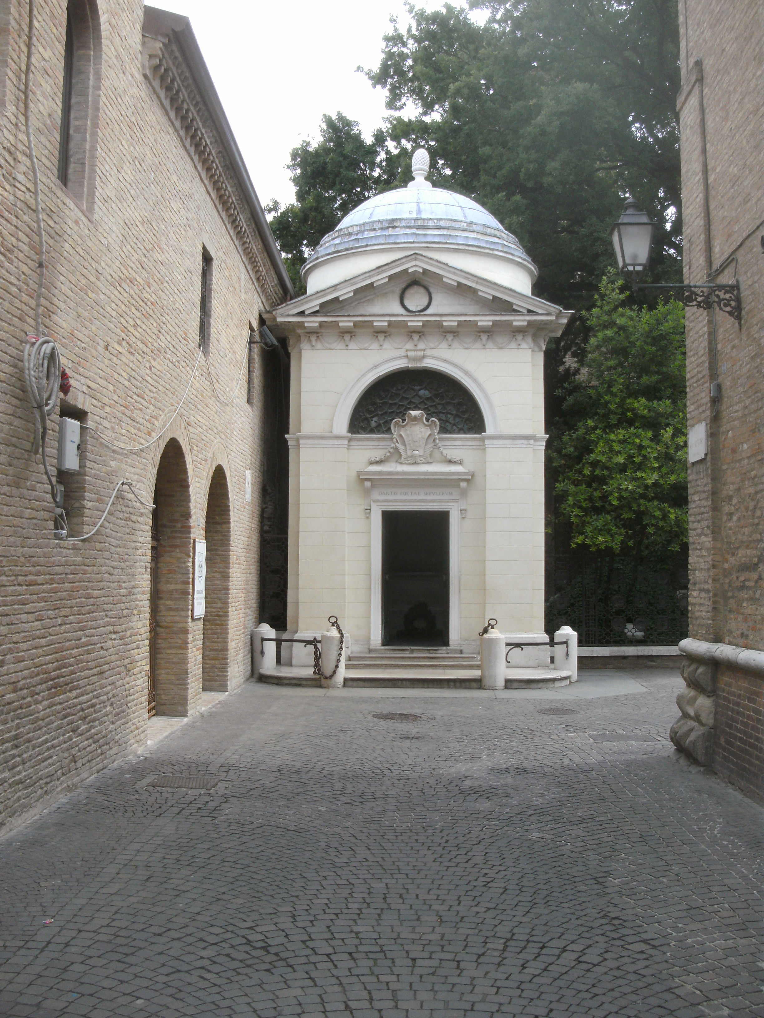 Ravenna, Außenansicht des Dante-Grabmals